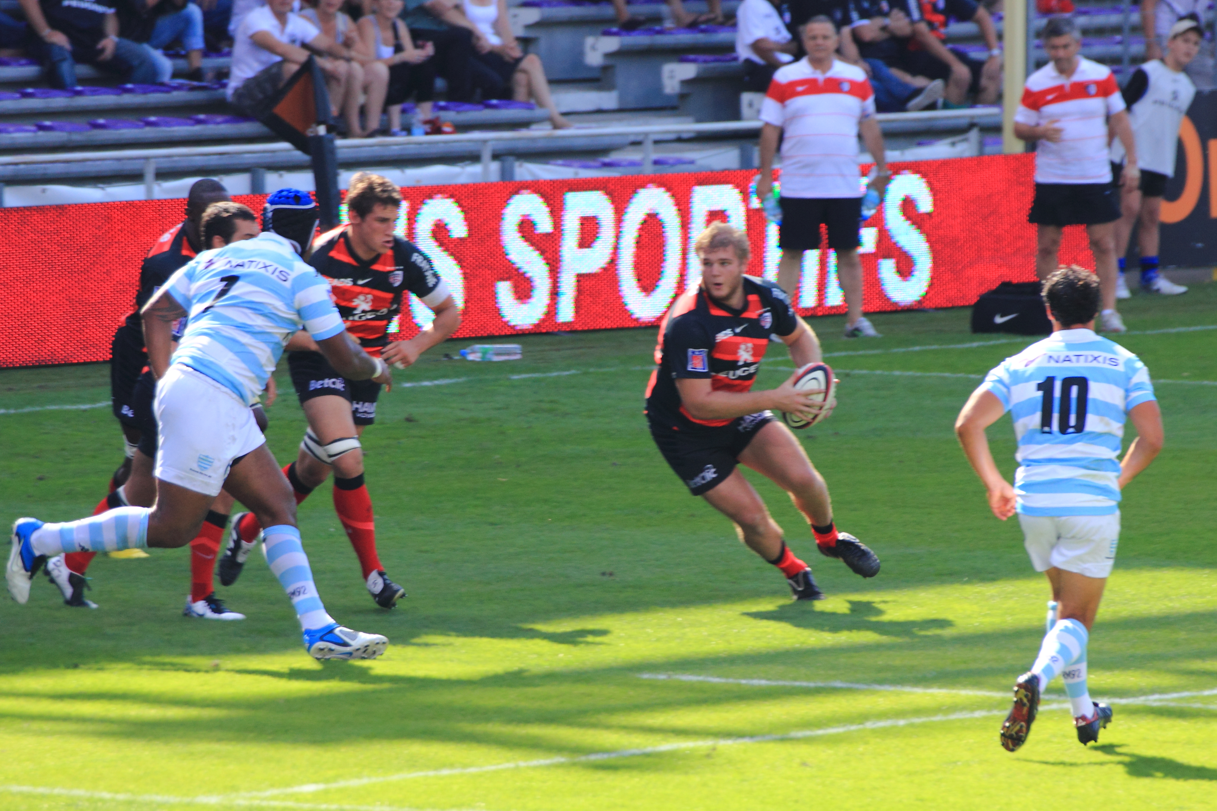 Galan charge balle en main